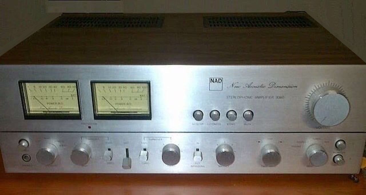 NAD 3060 - Front